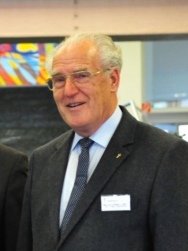 Altsuperintendent Ernst-Christian Gerhold.